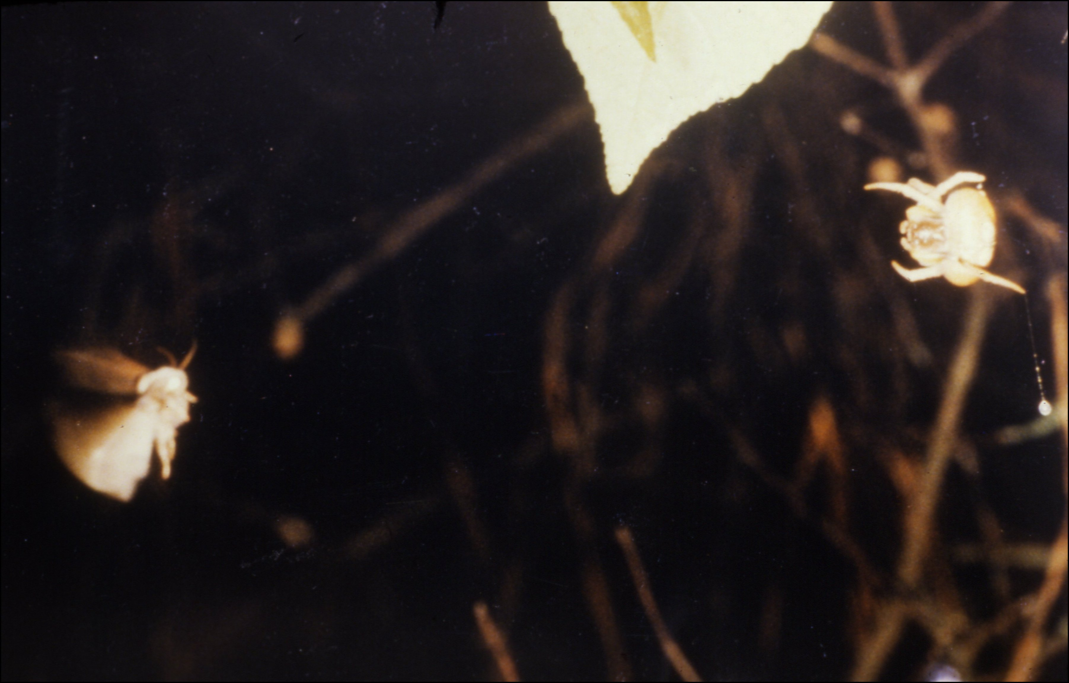 Mastophora cornigera tenant son bola avec une patte et attirant un Hétérocère mâle.